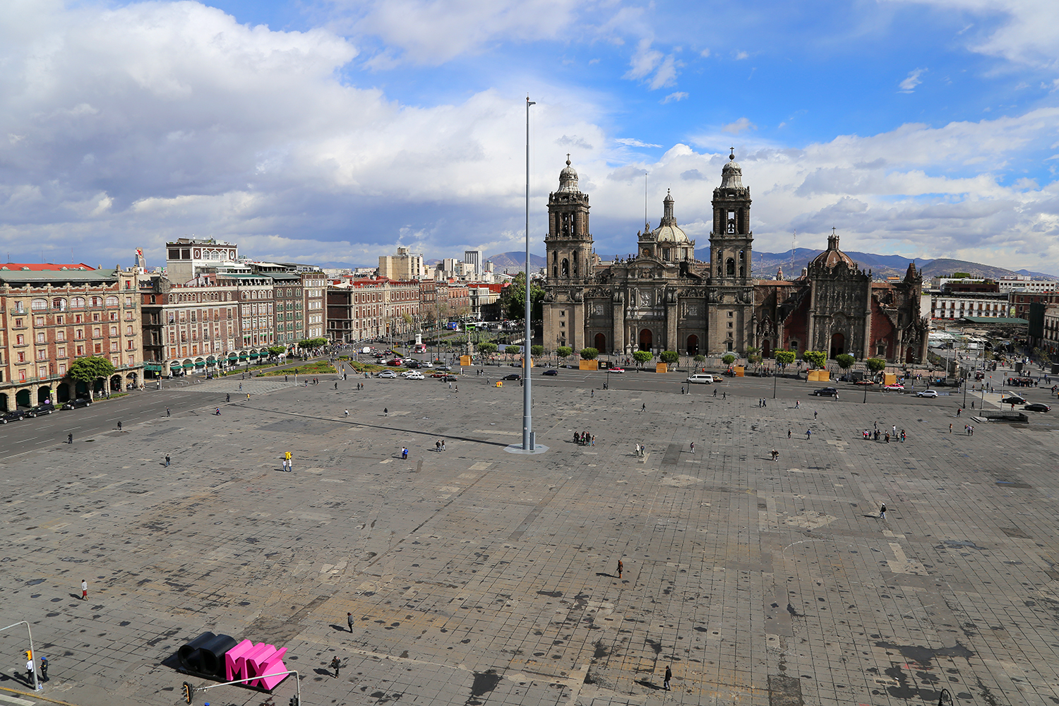 Panorámicas CDMX